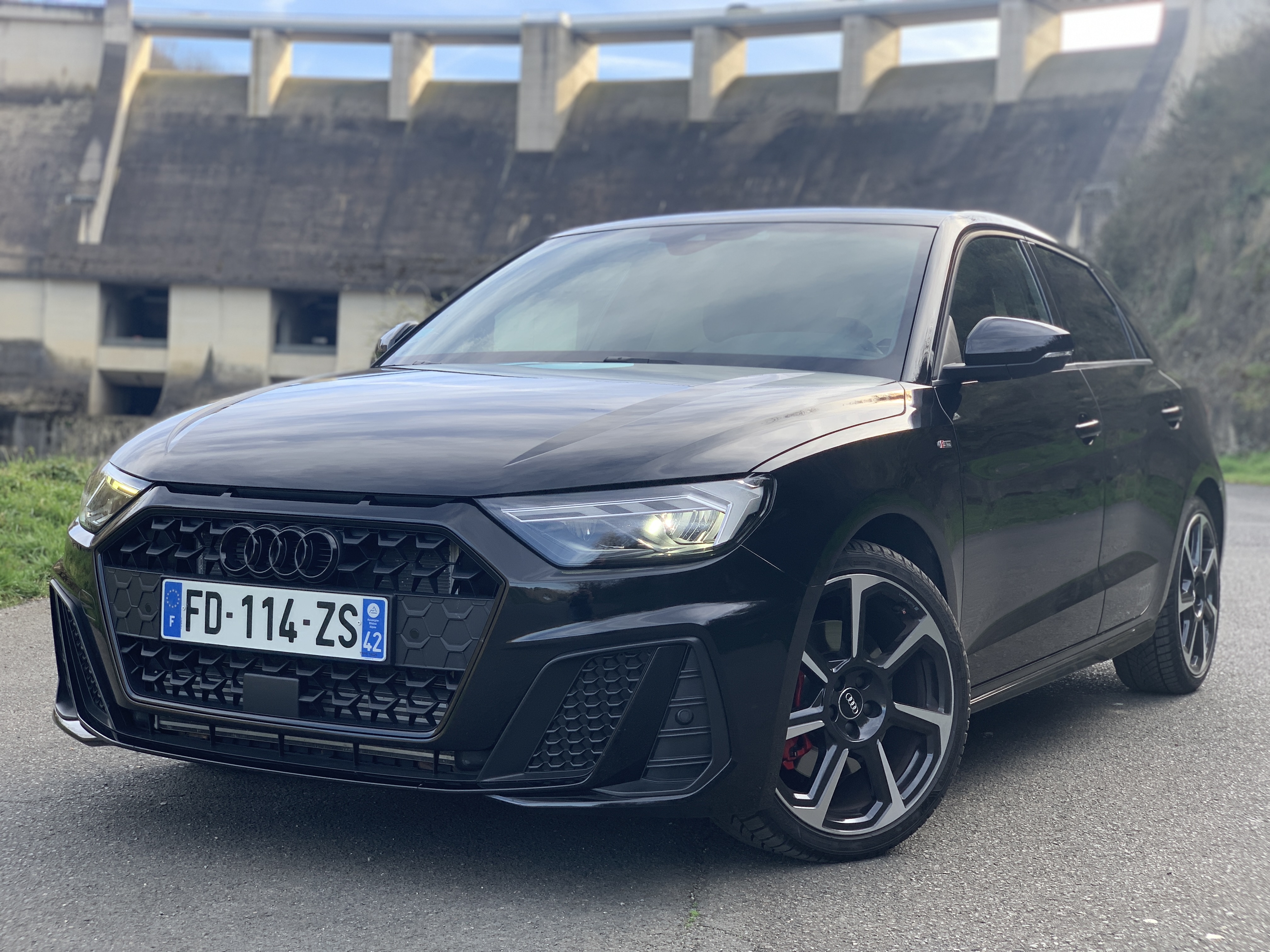 Vue 3/4 avant